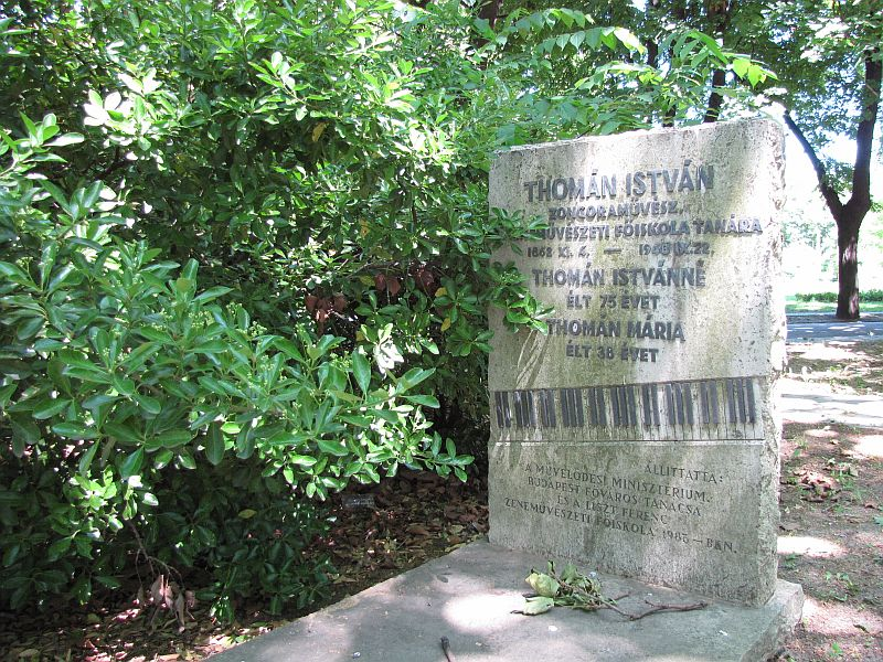 Thomán István (Homonna, 1862. november 4. – Budapest, 1940. szeptember 22.) zongoraművész és zongorapedagógus sírja Budapesten. Kerepesi temető: 42/1.